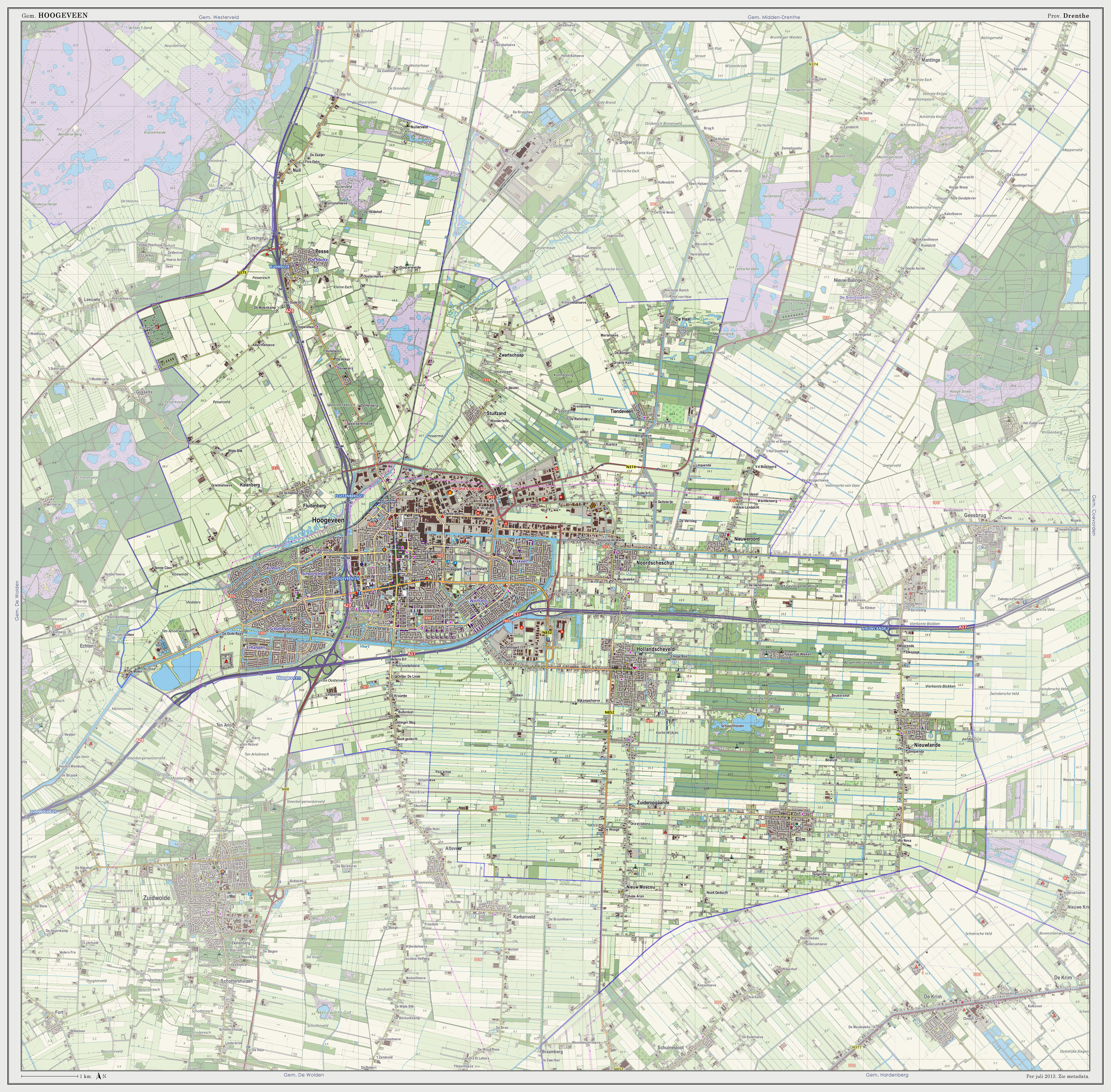 Topografische kaart van gemeente Hoogeveen (2013). Samengesteld door Jan-Willem van Aalst op basis van de GML open geodata van de BRT/Top10NL (basisregistratie Topografie, Kadaster 2011), vrijgegeven door Kadaster onder de Creative Commons BY licentie. Additionele gegevens uit BAG (8 juli 2013), uit de Open Street Map (9 juli 2013) en uit de Risicokaart. Peildatum kaartbeeld: 9 juli 2013. Zie ook Gemeentenatlas.nl Samenstelling en kleurenschema: Jan-Willem van Aalst, met QuantumGIS en Photoshop. Zie ook de Legenda.